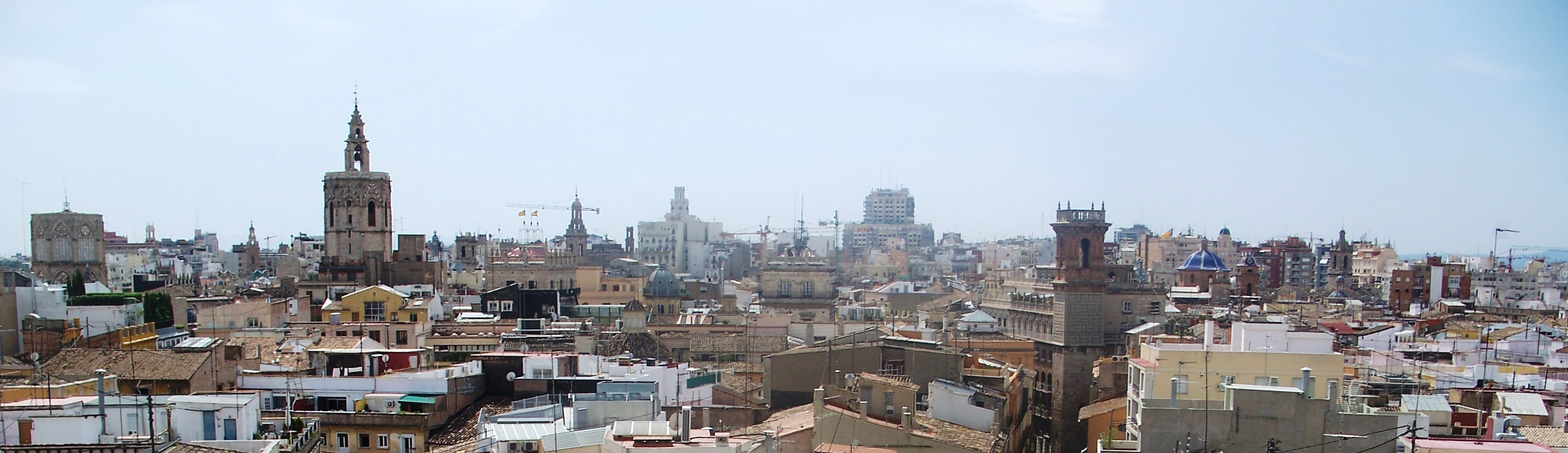 Old_city_of_Valencia_Skyline_from_Serrans_Towers